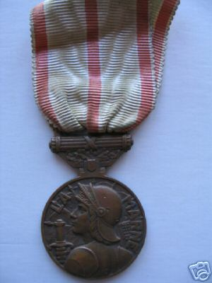 Médaille de la Marne